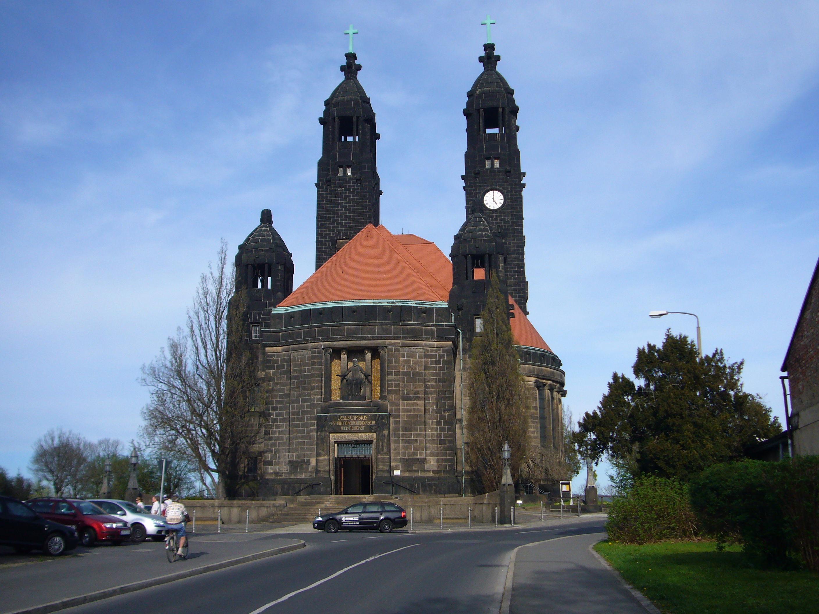 Dresden-Strehlen, Christuskirche, Außenansicht